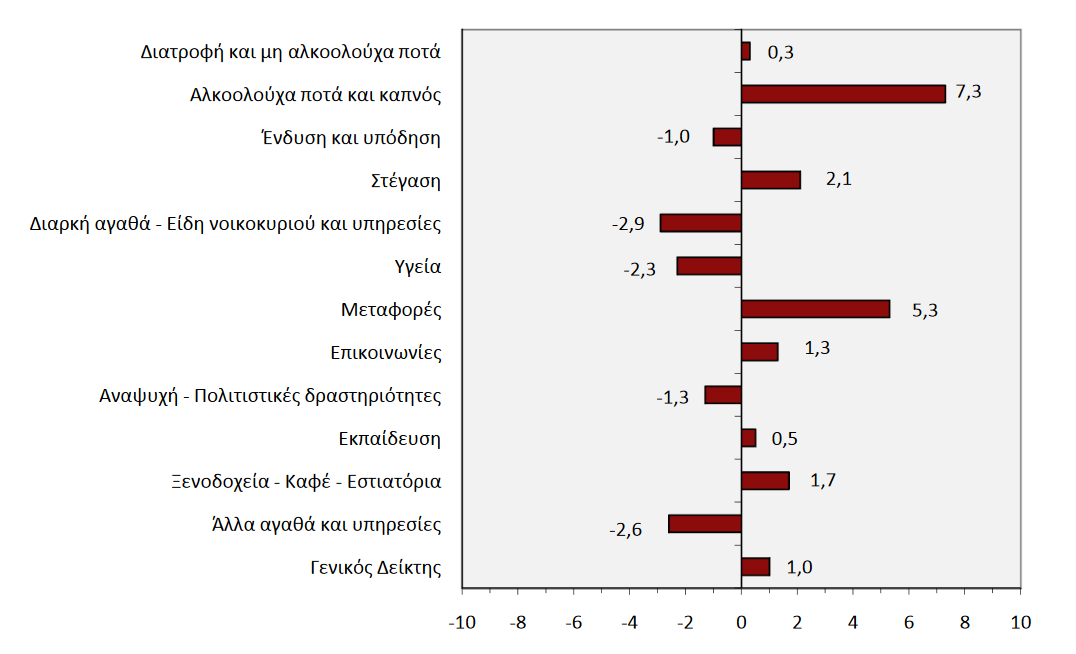 Ετήσιες μεταβολές (%) ΔΤΚ, Σεπτέμβριος 2016 - 2017. Πηγή ΕΛΣΤΑΤ